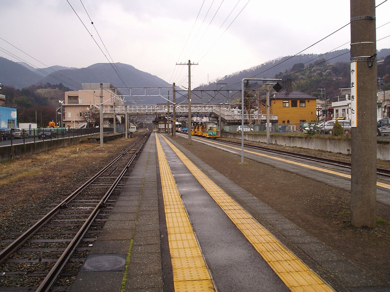 Central Japan Railway Company, Yamakita Sta. Platform